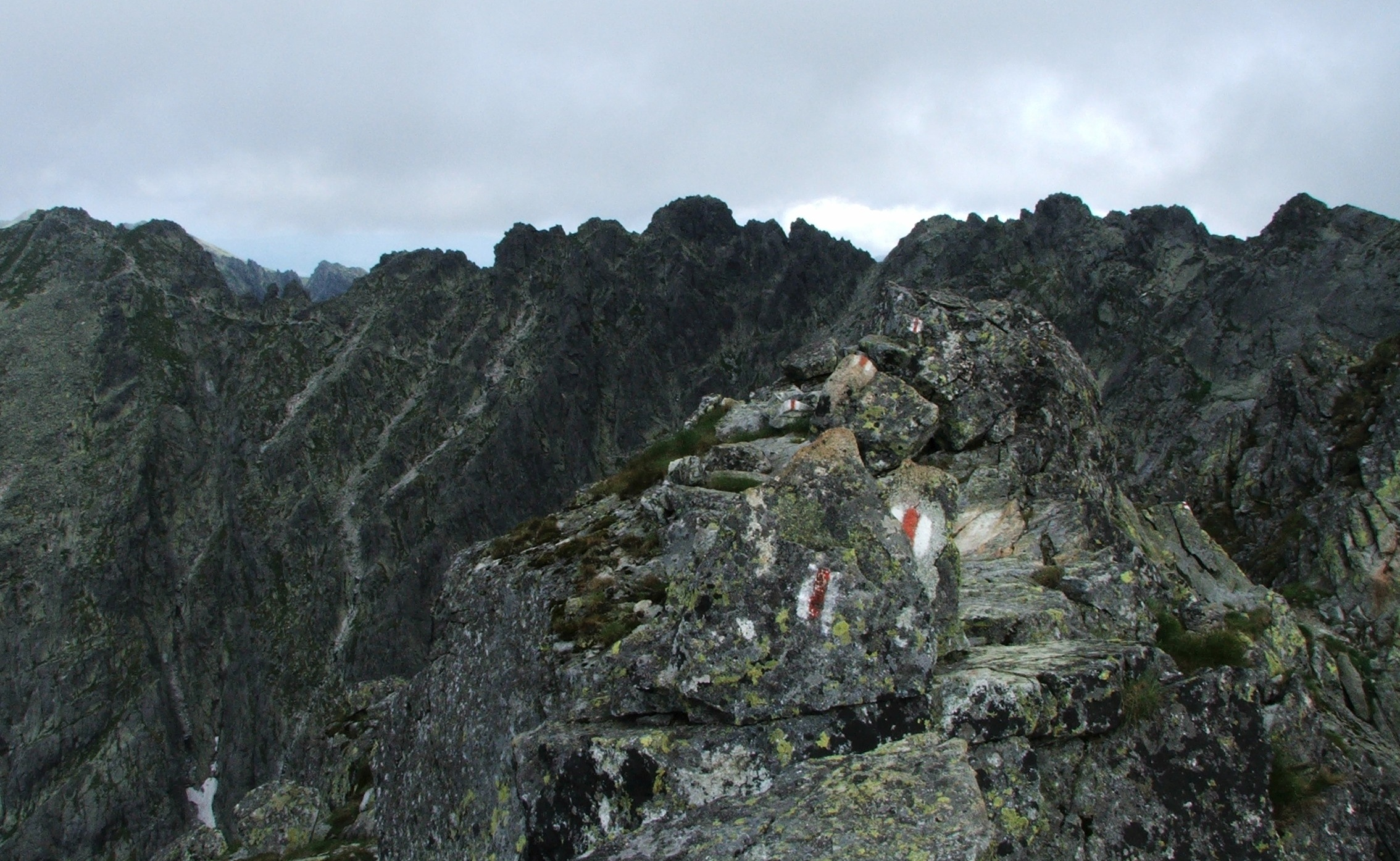 Sieczkowe Turnie (po lewej) i Czarne Ściany (po prawej)